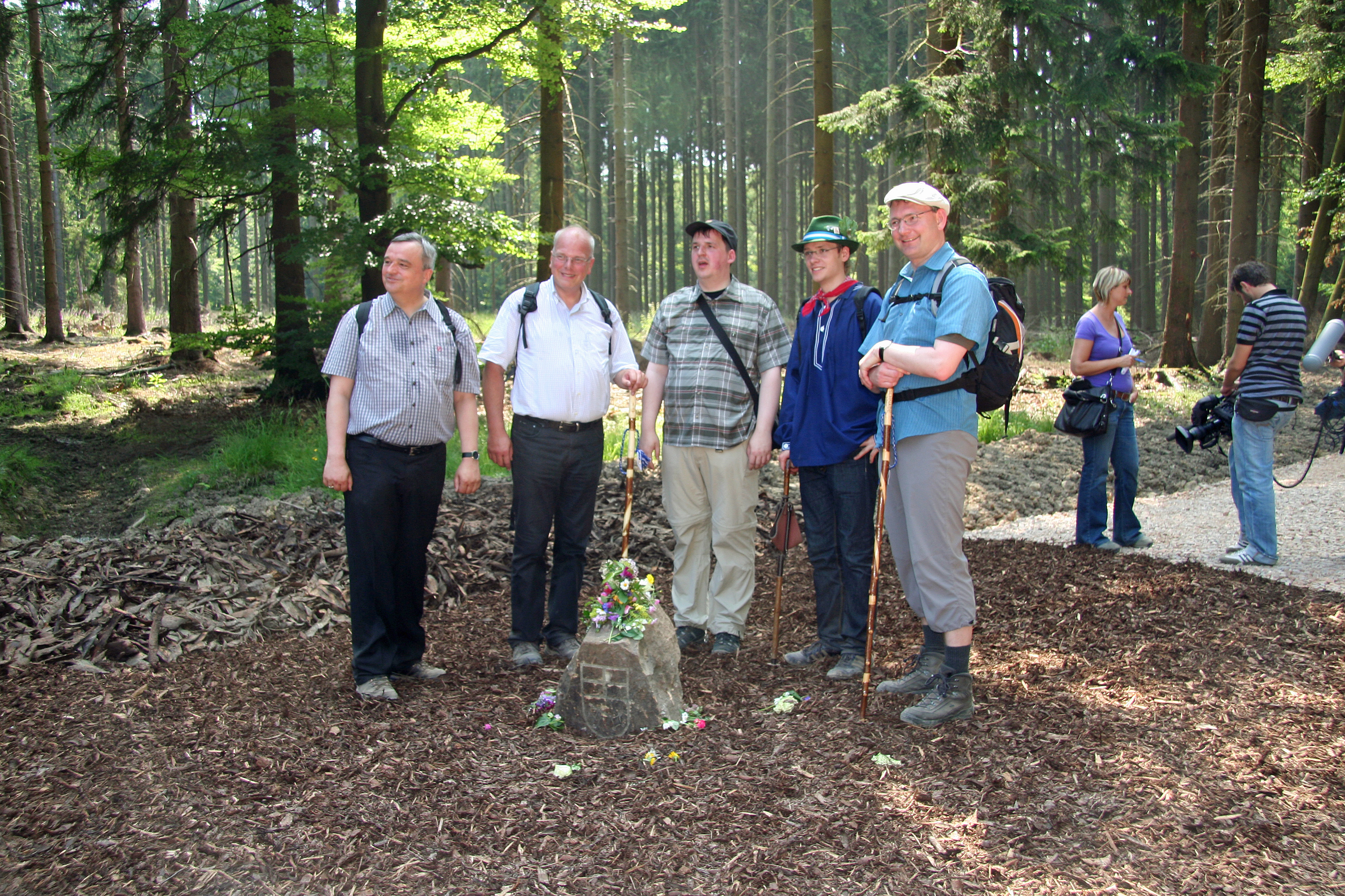 Geistliche Herren posieren am Schnadestein, links Bischof Wiesemann (Frühstücksplatz)